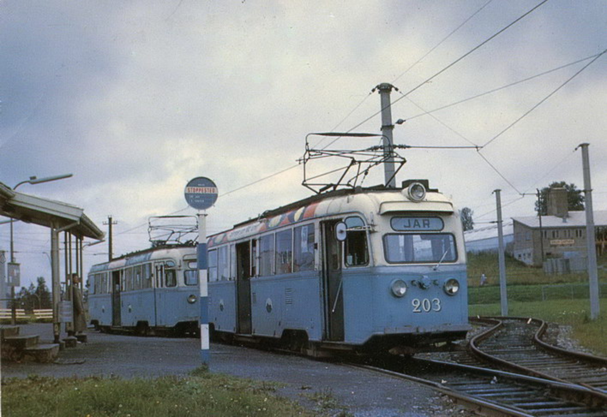 Oslo Sporveier. Trikk motorvogn 203 og 200 type Gullfisk B1 på linjen Østensjø-Lilleakerbanen (Bøler- Jar), ved endeholdeplassen.